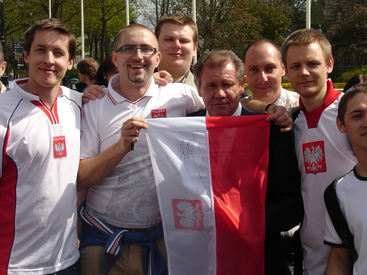 Włodzimierz Smolarek (Polish footballer)